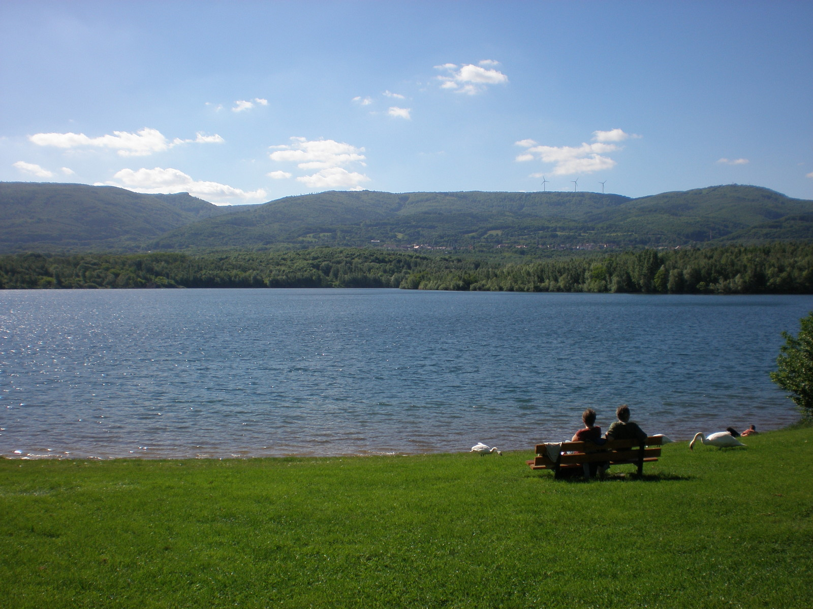 Jezero Barbora z hlavní pláže. V pozadí hřbet Krušných hor nad městem Hrob.